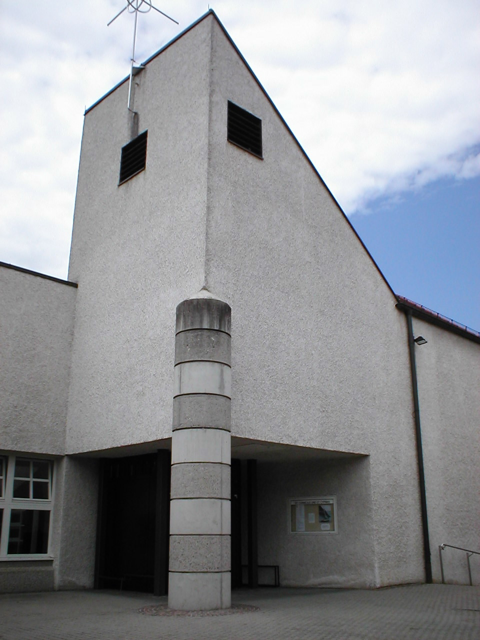 St. Cornelius und Cyprian Kirche in Biberach. Neubau nach Abriss eines älteren Vorgängerbaus 1984.